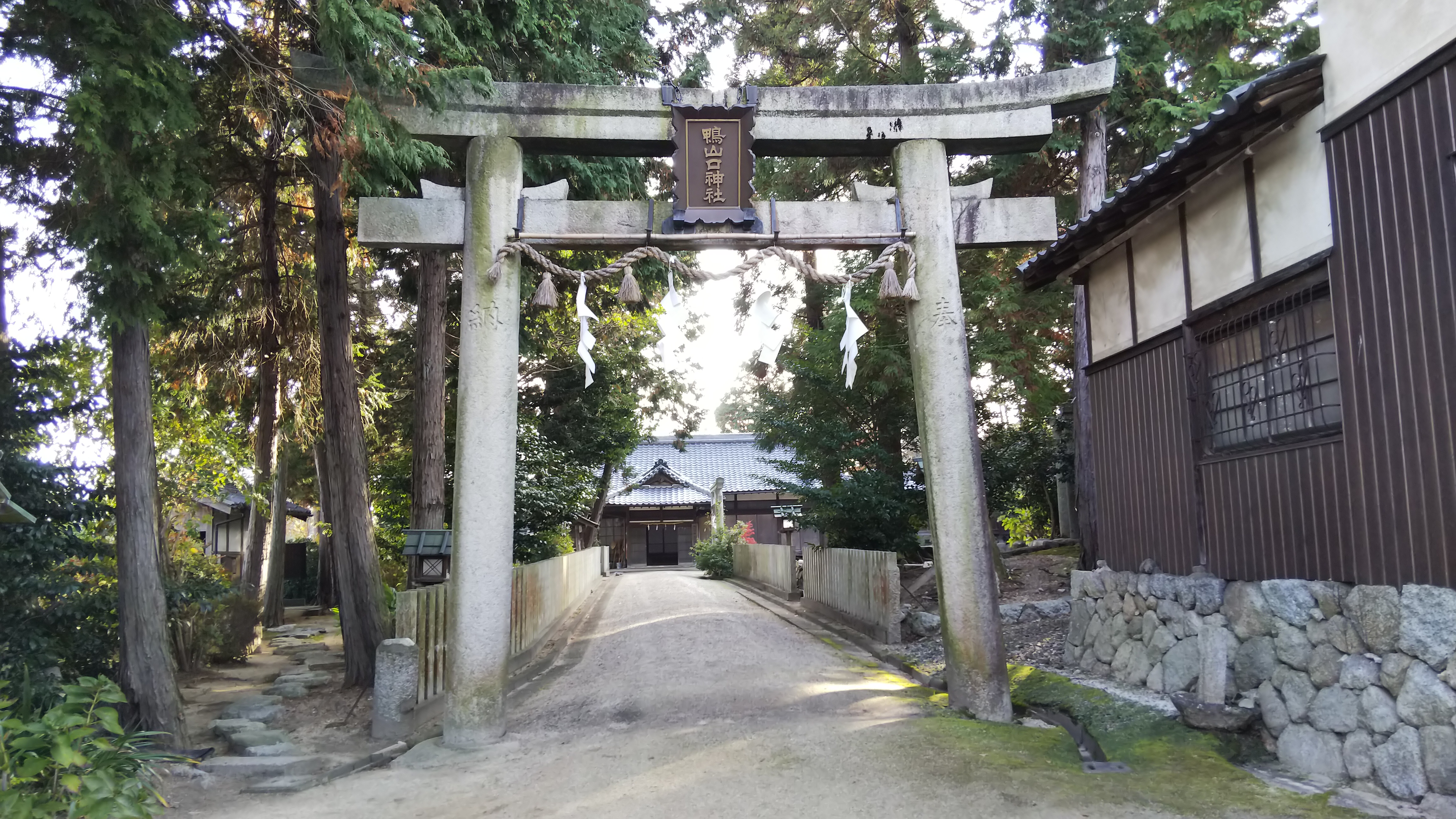 鴨山口神社鳥居